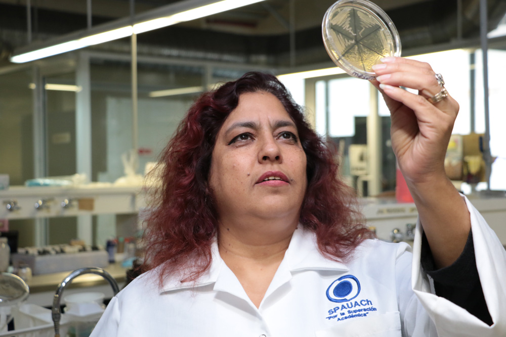 Microbiología Aplicada